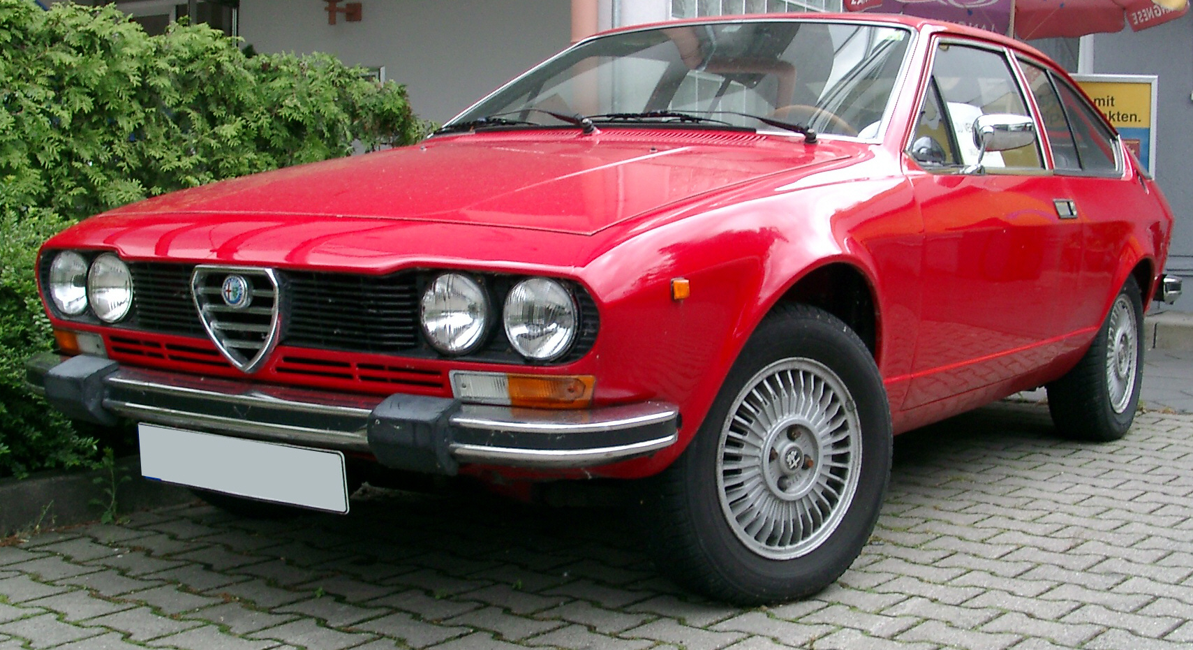 Alfa Romeo GTV Coupé